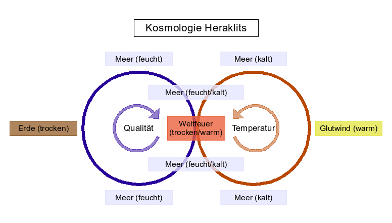 schematische Darstellung der Kosmologie Heraklits nach DK 22 B 31